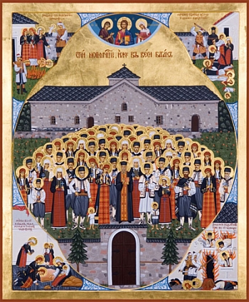 На иконата са изобразени Баташките новомъченици в двора на историческата Баташка църква "св. мчца Неделя". Над църквата са изографисани Господ Иисус Христос, Пресвета Богородица и св вмчца Неделя. В четирите ъгъла на иконата са изобразени сцени от мъченическия подвиг на мъчениците.